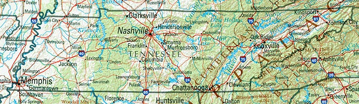 Karte Tennessees.